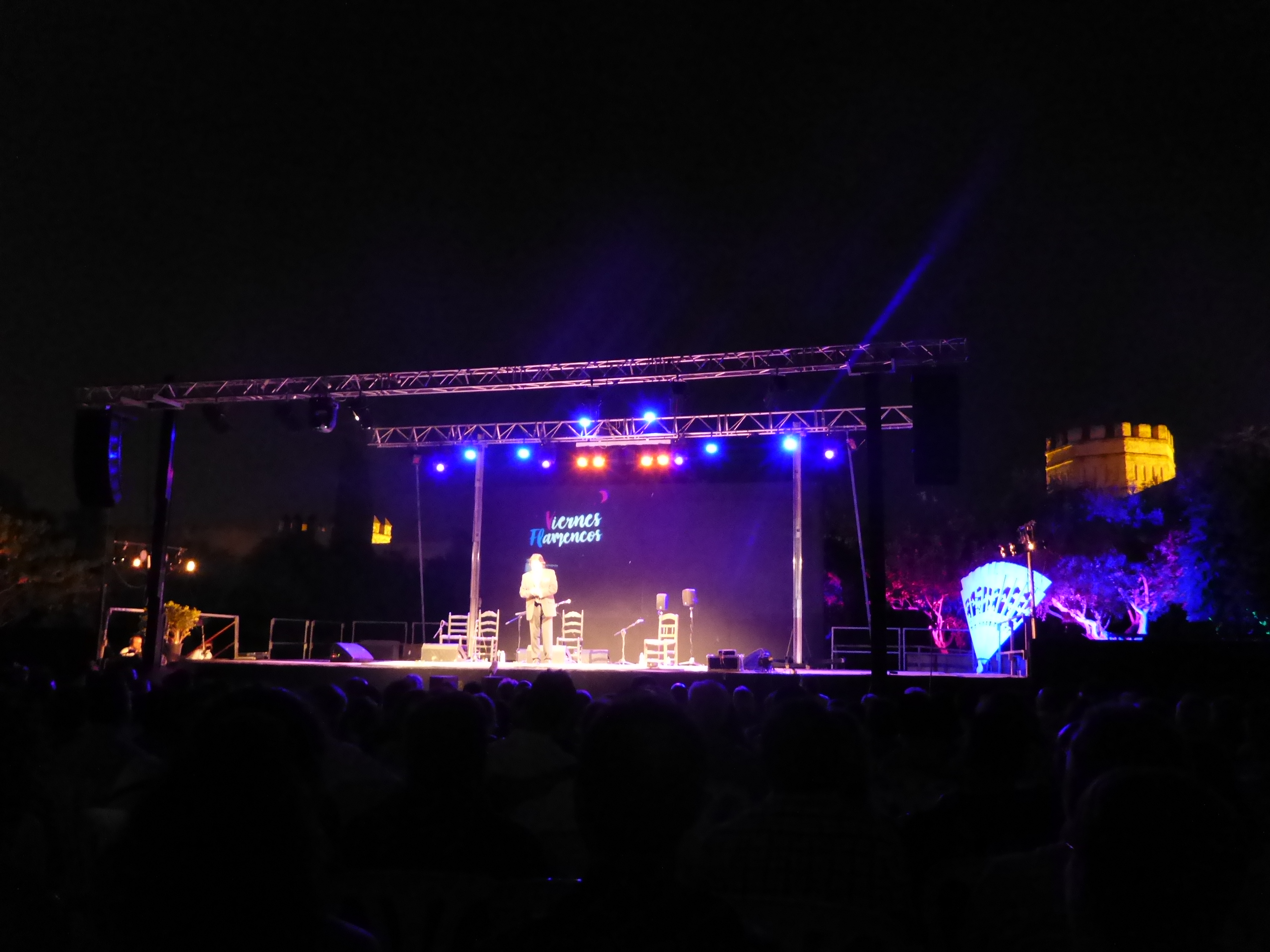 Vicente Soto "Sordera". Viernes Flamenco en Jerez: 5 de agosto de 2016, familia Sordera